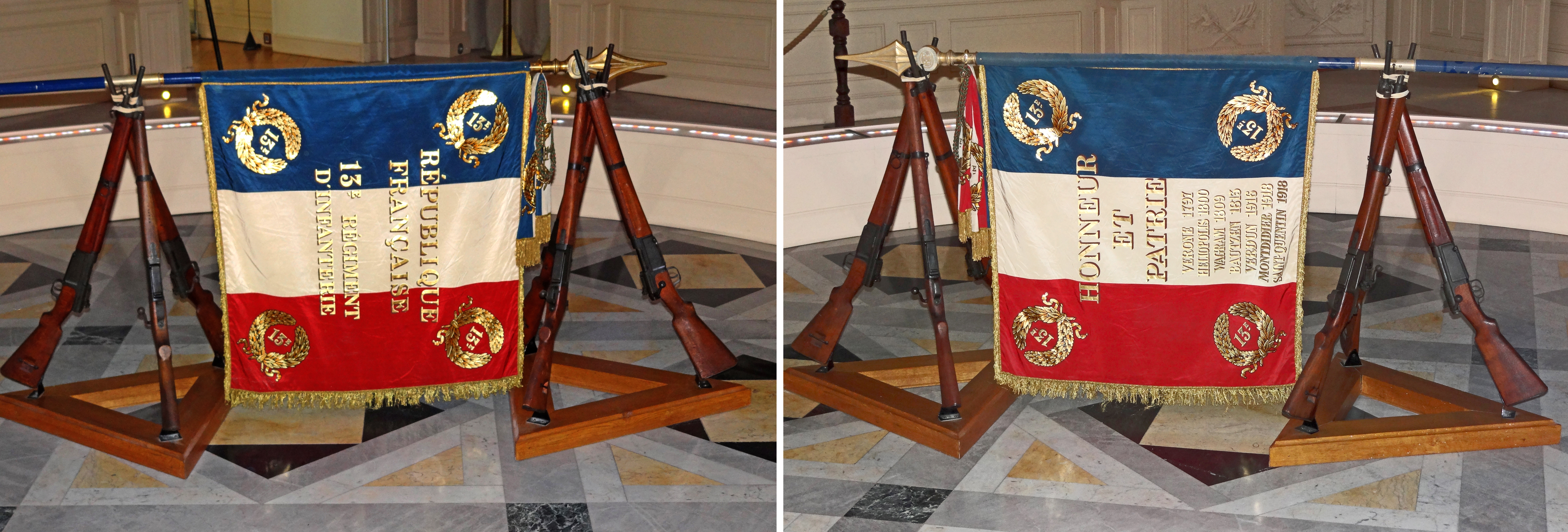 Drapeau du 13e RI en la cathédrale de Nevers lors de la commémoration du centenaire du début de la première guerre mondiale.